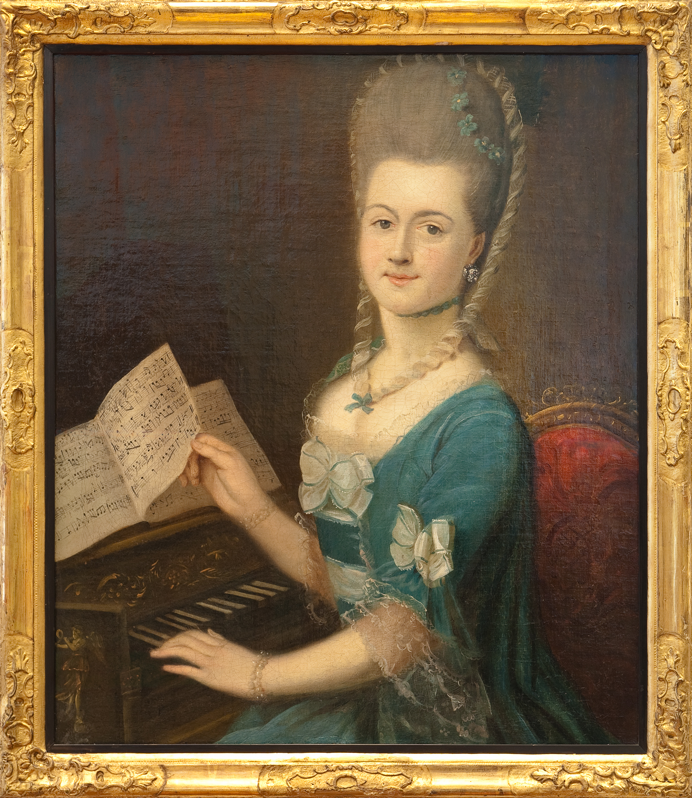 Portät von Johanna Elisabeth von Winthem geb. Dimpfel aus dem Jahr 1775, der Nichte von Meta Klopstock. Im Jahr 1791 heiratete sie Friedrich Gottlieb Klopstock. Die Noten in ihrer Hand zeigen dessen "Vaterlandslied" ("Ich bin ein deutsches Mädchen") in der Vertonung Carl Philipp Emanuel Bachs, das Klopstock der Porträtierten gewidmet hatte. Erstdruck des Liedes im "Göttinger Musenalmanach" 1774 zwischen den Seiten 100 und 101.[1] Erstveröffentlichung des Gedichts in »Staats- und Gelehrte Zeitung Des Hamburgischen unpartheyischen Correspondenten«, 1771, den 19 April.[2] Fotografiert im Museum für Hamburgische Geschichte, Hamburg, Deutschland.